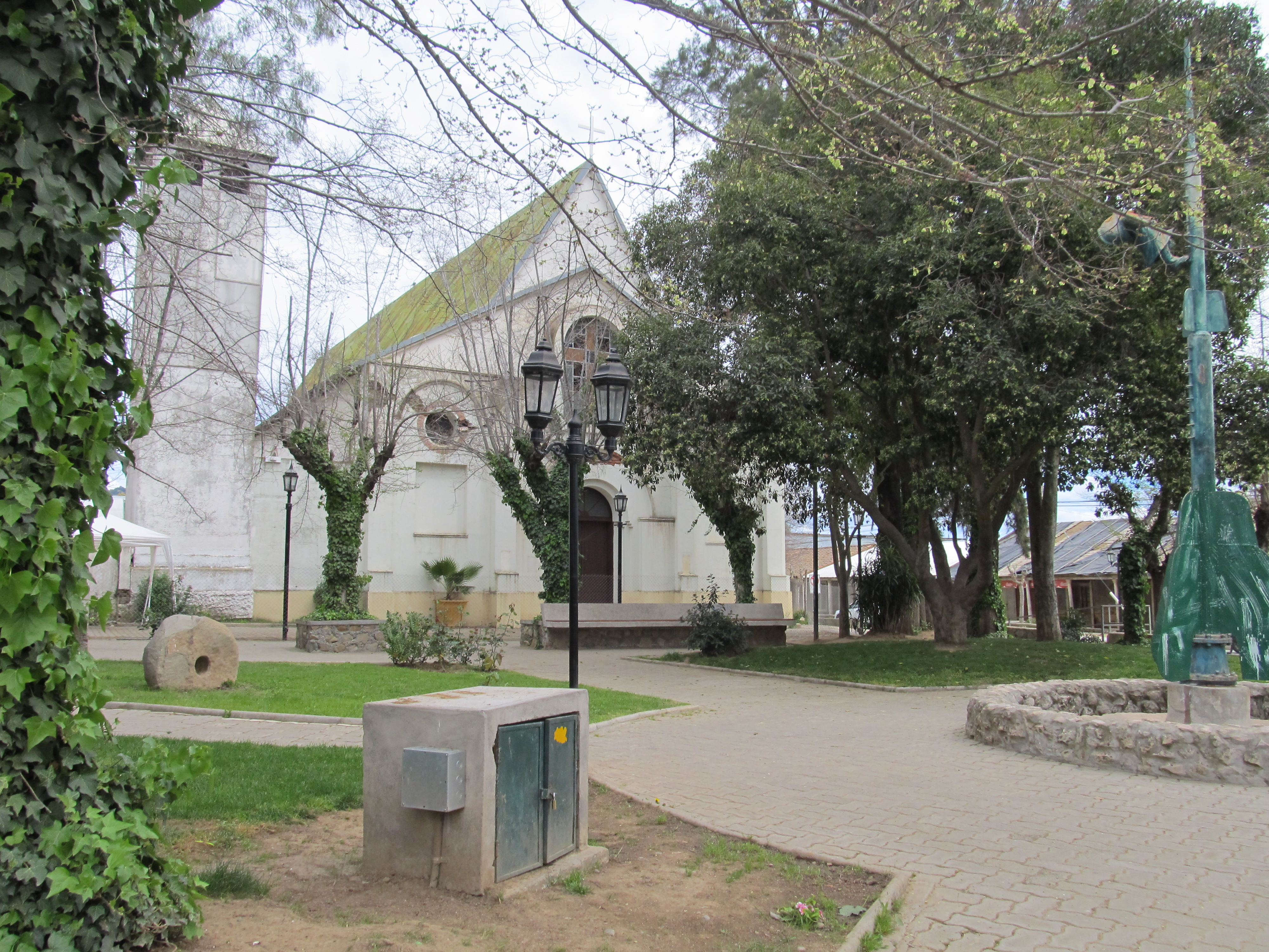 Centro histórico de Lolol This is a photo of a national monument in Chile: 586